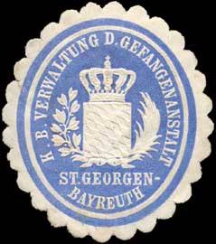 Sealing stamp Title: Königlich Bayerische Verwaltung der Gefangenanstalt St. Georgen - Bayreuth Description: hellblau, weiß, geprägt Place: Bayreuth size: 4x4 cm